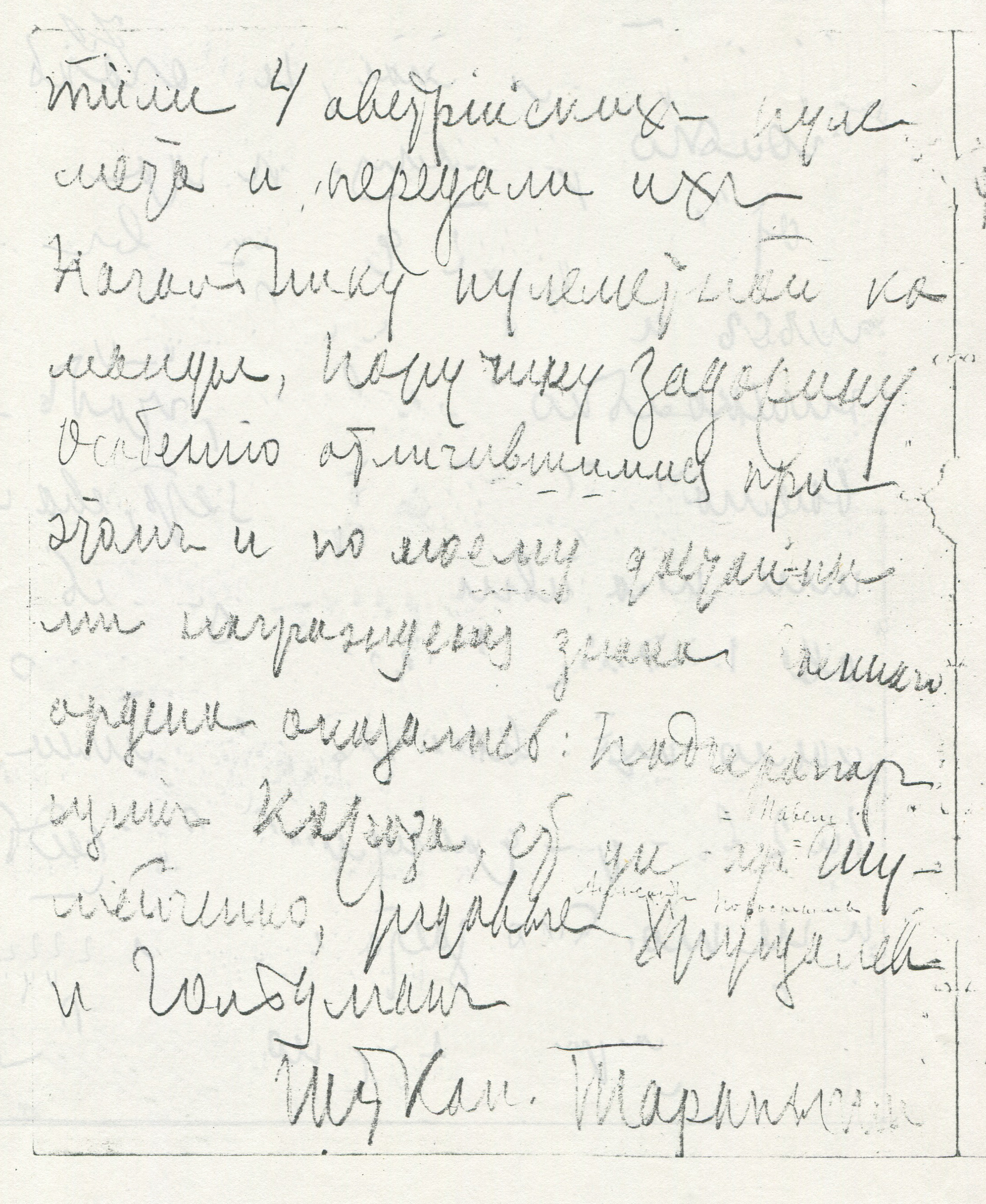 Доклад Тарапыгина П. И. о недавнем бое